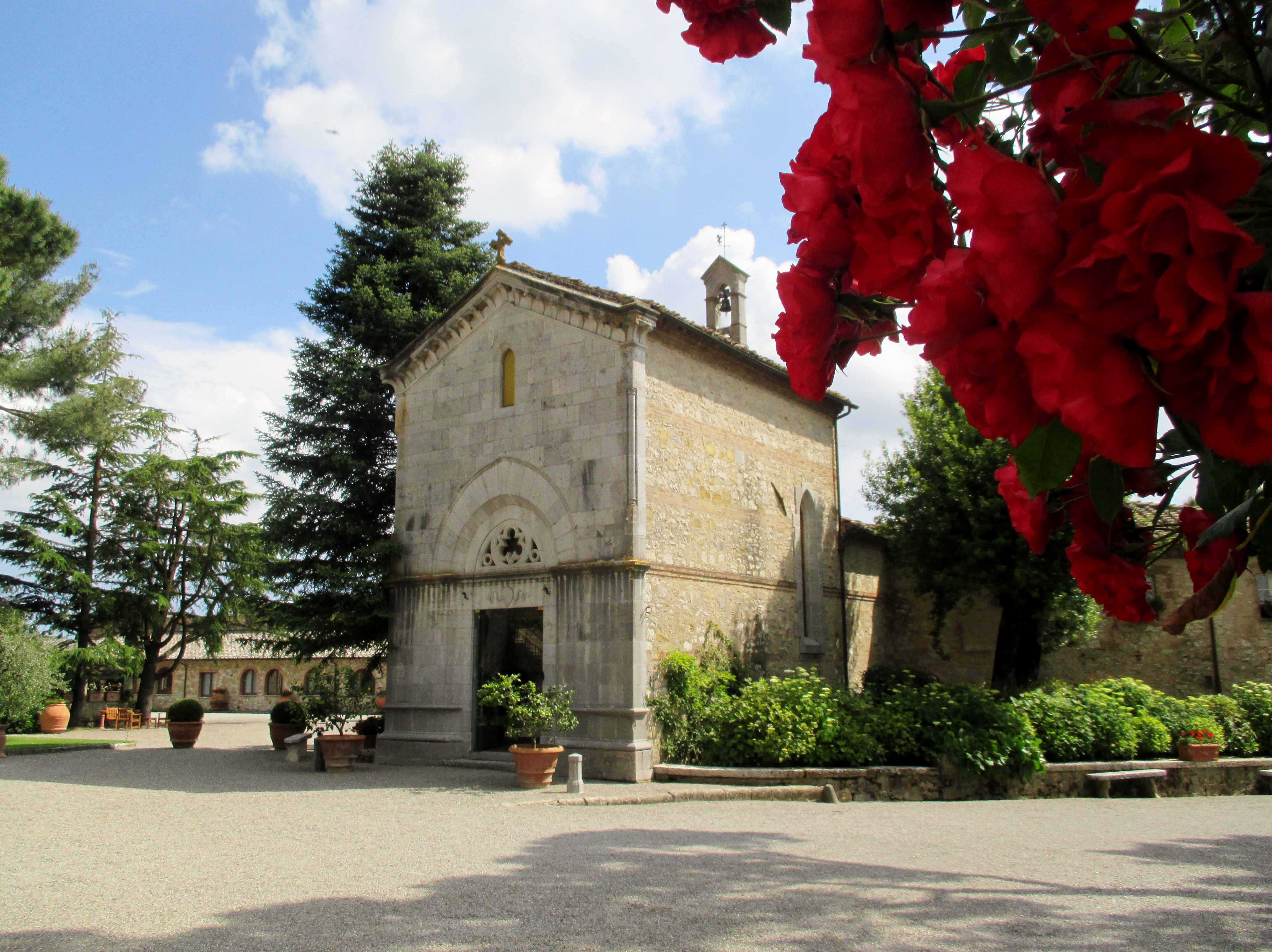 Castelnuovo Berardenga (SI), Cappella della Madonna del Libro, in località San Felice